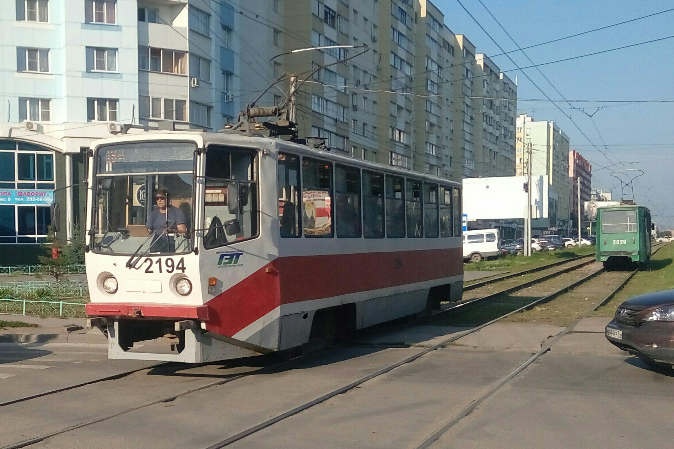 Трамвай 71-608КМ №2194 в Новосибирске на 18-м маршруте